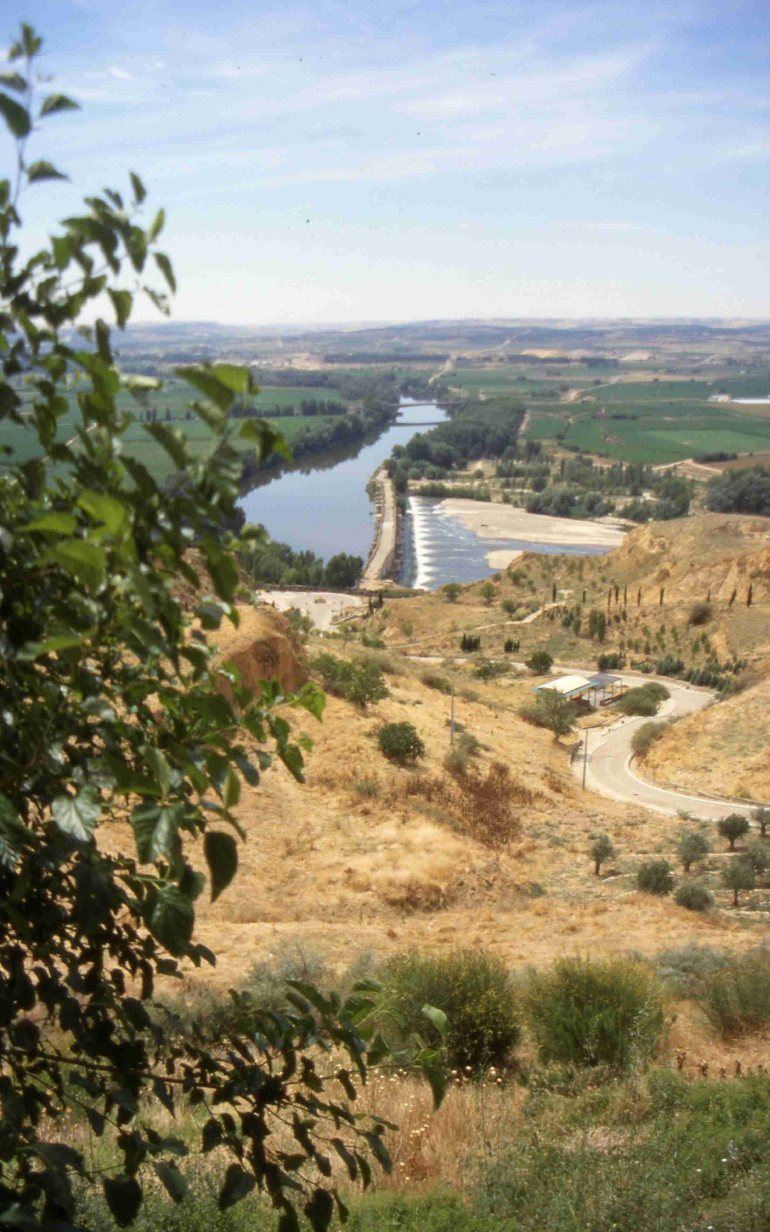 Toro, Blick auf den Douro